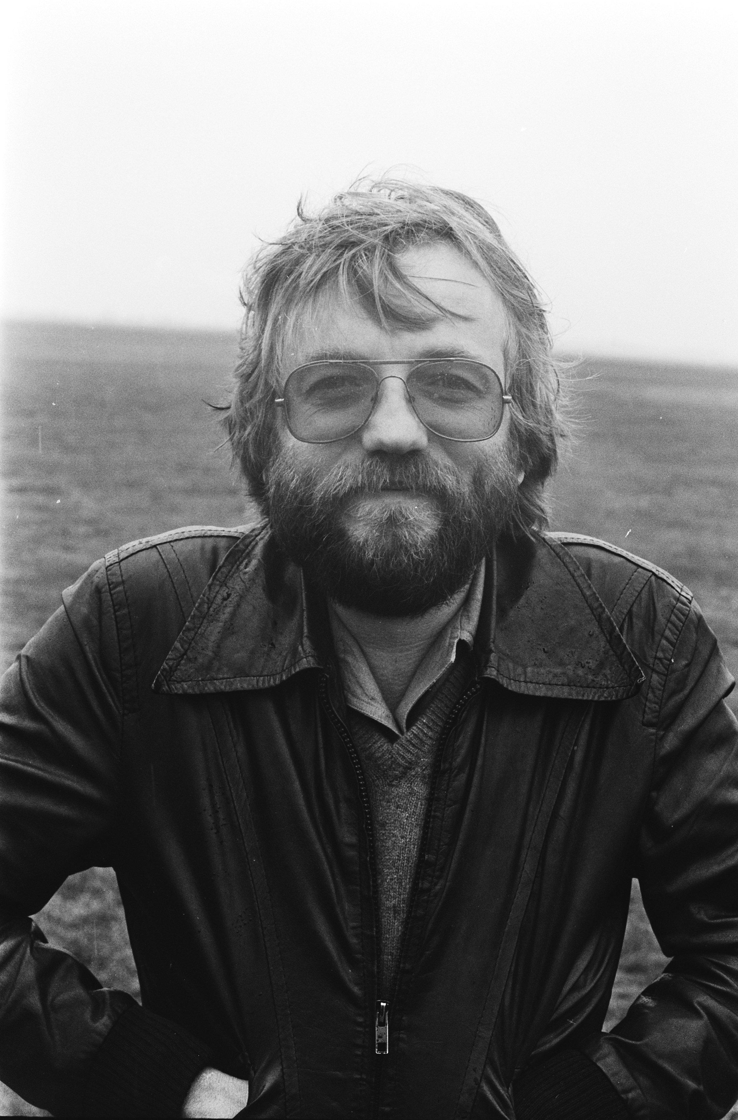 Collectie / Archief : Fotocollectie Anefo Reportage / Serie : [ onbekend ] Beschrijving : Tour de France equipe NOS radio; nr. 12, 13 Lex Harding (kop), nr. 14, 5 Ferry Maat (kop) Datum : 28 juni 1978 Trefwoorden : equipes, wielrennen Instellingsnaam : NOS, Tour de France Fotograaf : Verhoeff, Bert / Anefo Auteursrechthebbende : Nationaal Archief Materiaalsoort : Negatief (zwart/wit) Nummer archiefinventaris : bekijk toegang 2.24.01.05 Bestanddeelnummer : 929-7974